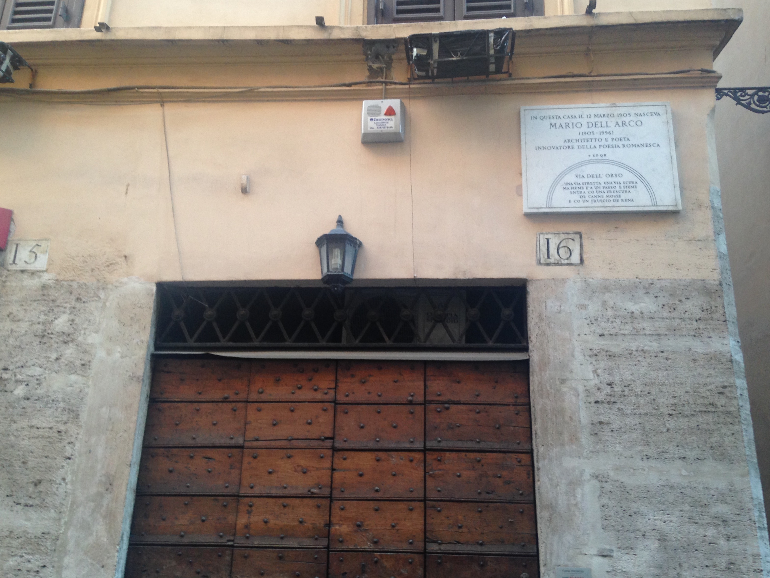 Roma, via dell'Orso 85, memoria di Mario dell'Arco